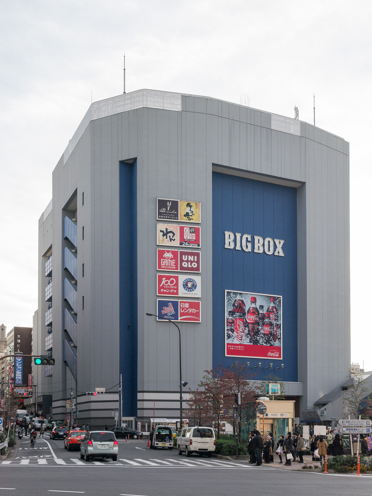 高田馬場Big Box、東京都新宿区高田馬場。